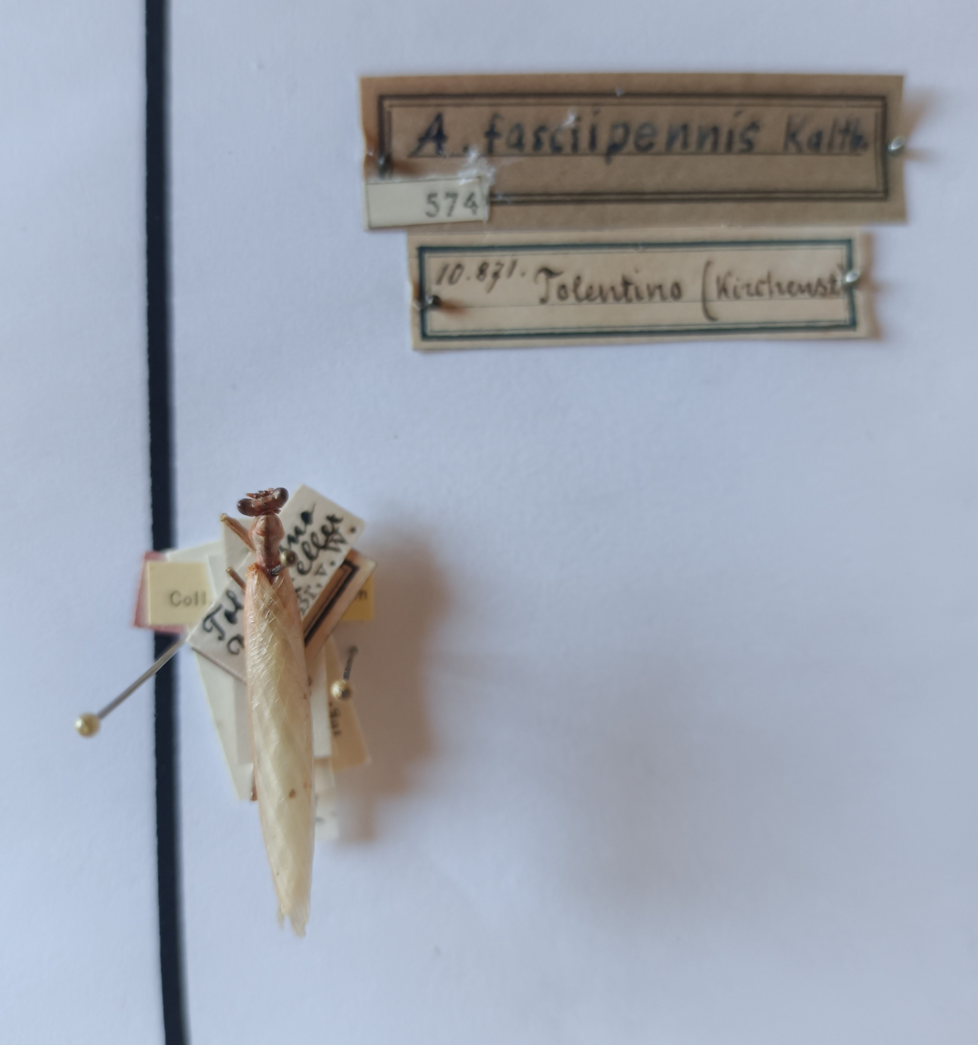 Foto mia di una mantide marchigiana. Anche il dito è mio.